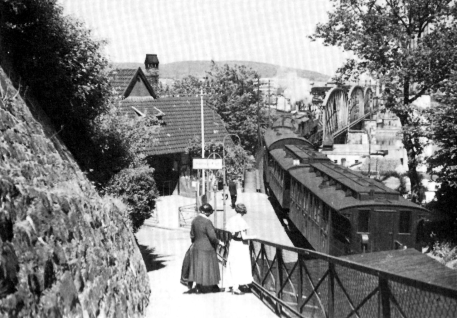 Haltepunkt Hameln-Klüt, Strecke Hameln-Lage (Begatalbahn), mit Weserbrücke um 1920